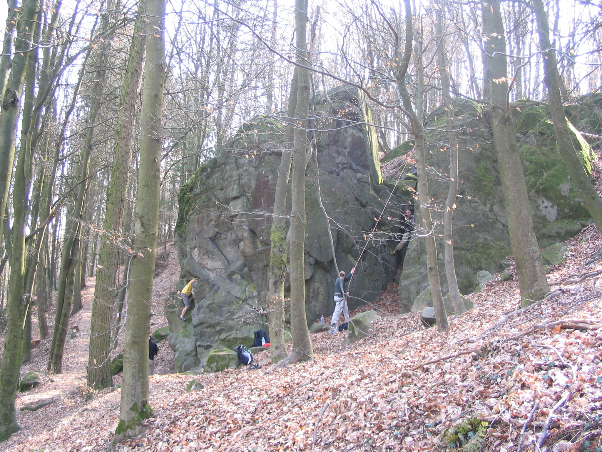 Brohmfels der Gabbroklippenformation am Nieder-Beerbacher Hang des Magnetberges südlich Darmstadts (Odenwald, Frankenstein-Komplex)